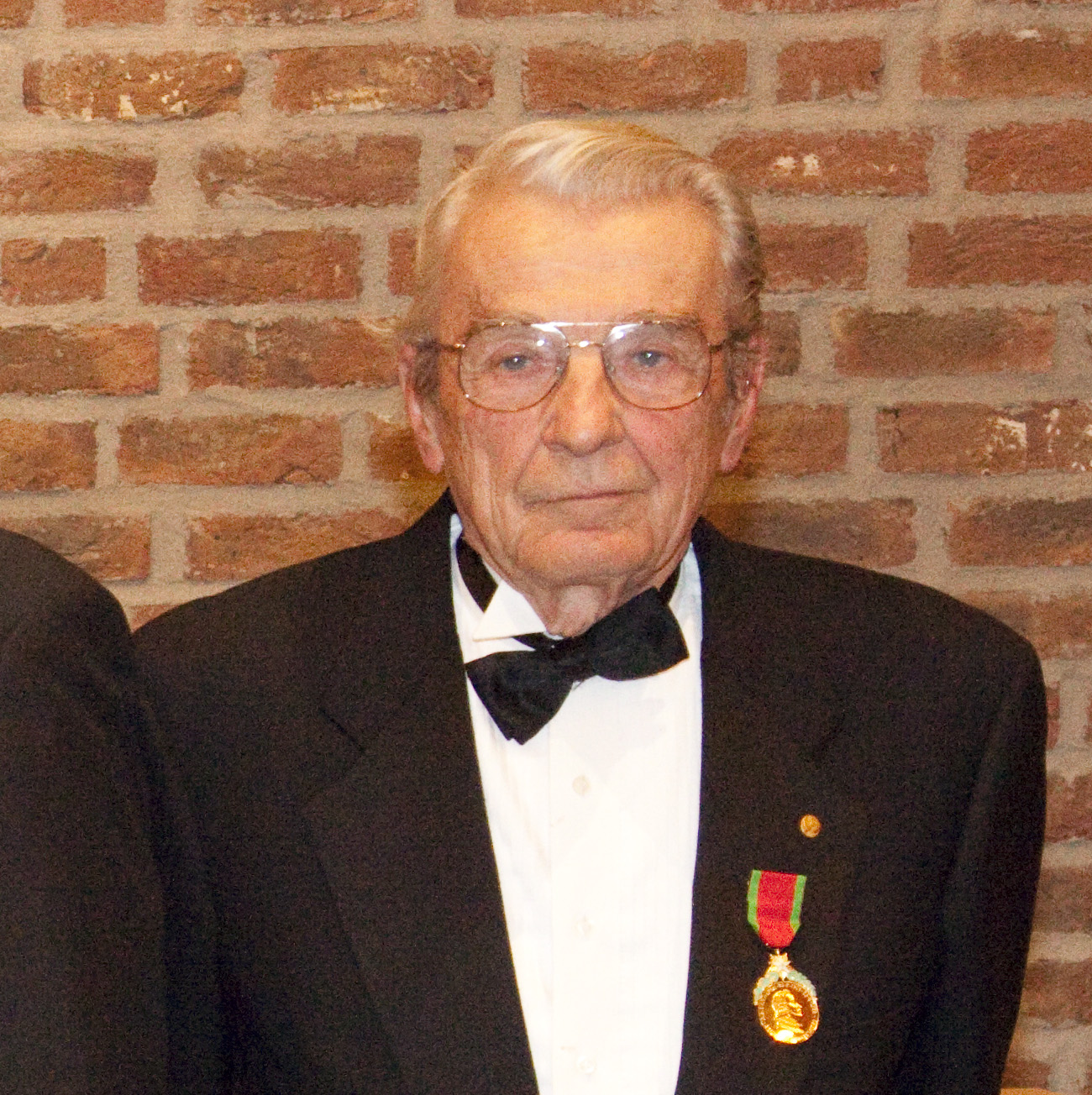 Ivar Giaever. Foto: Bruce Sampson / NTNU Vitenskapsmuseet.